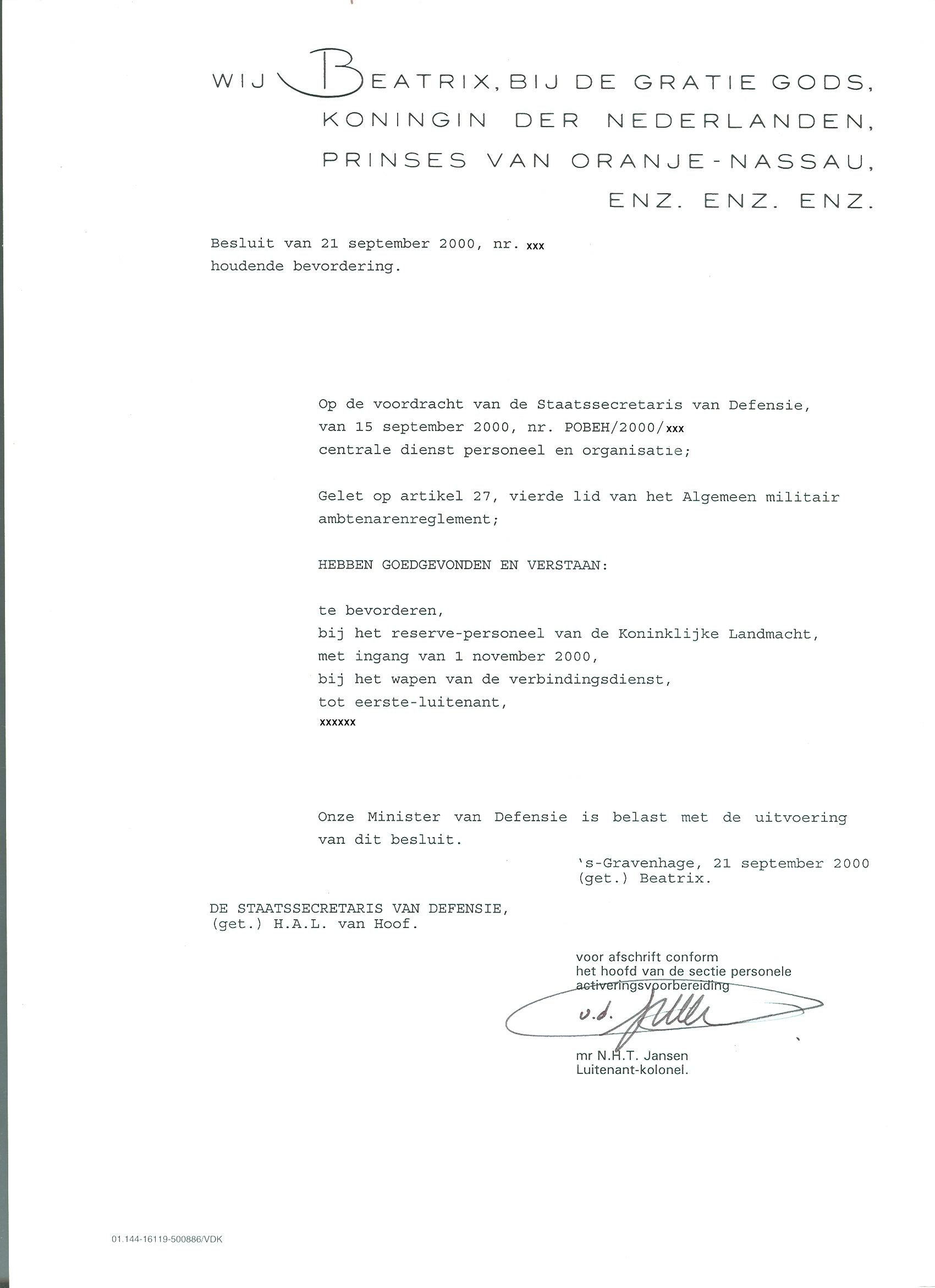 Voorbeeld van een Nederlands Koninklijk Besluit